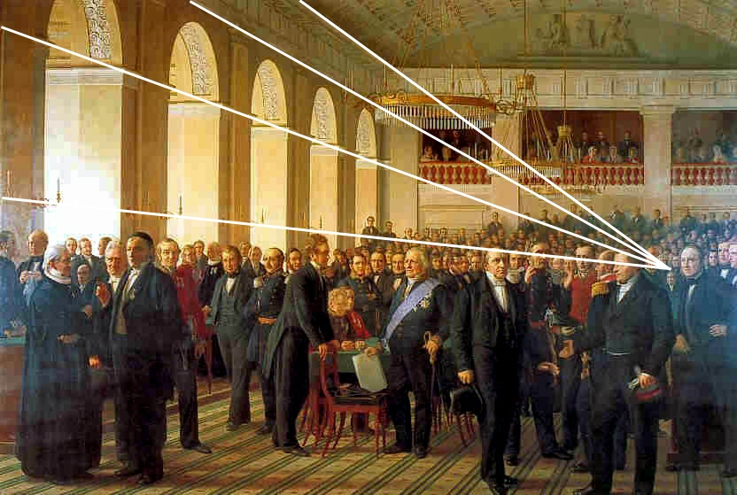 Perspektivet i Constantin Hansens malerie "Den Grundlovgivende Forsamling i 1848"